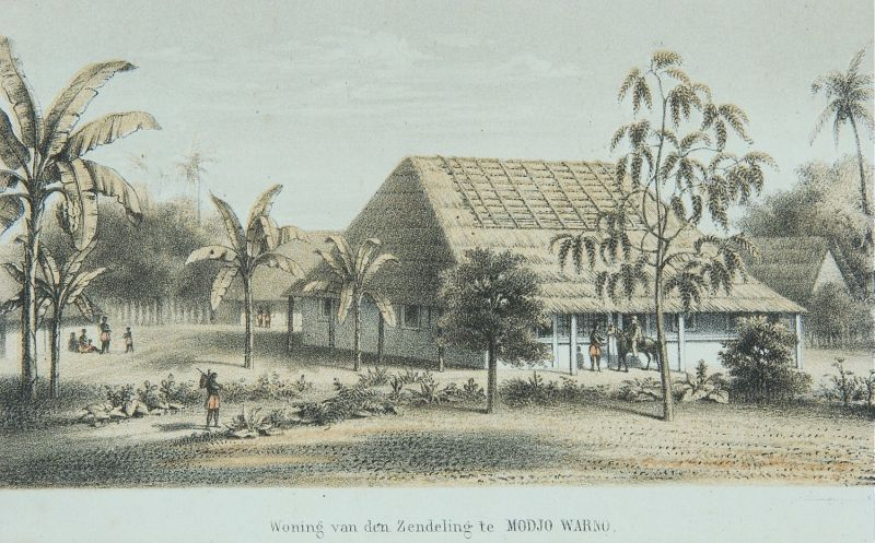 Litho. De woning van een zendeling in Modjo Warno